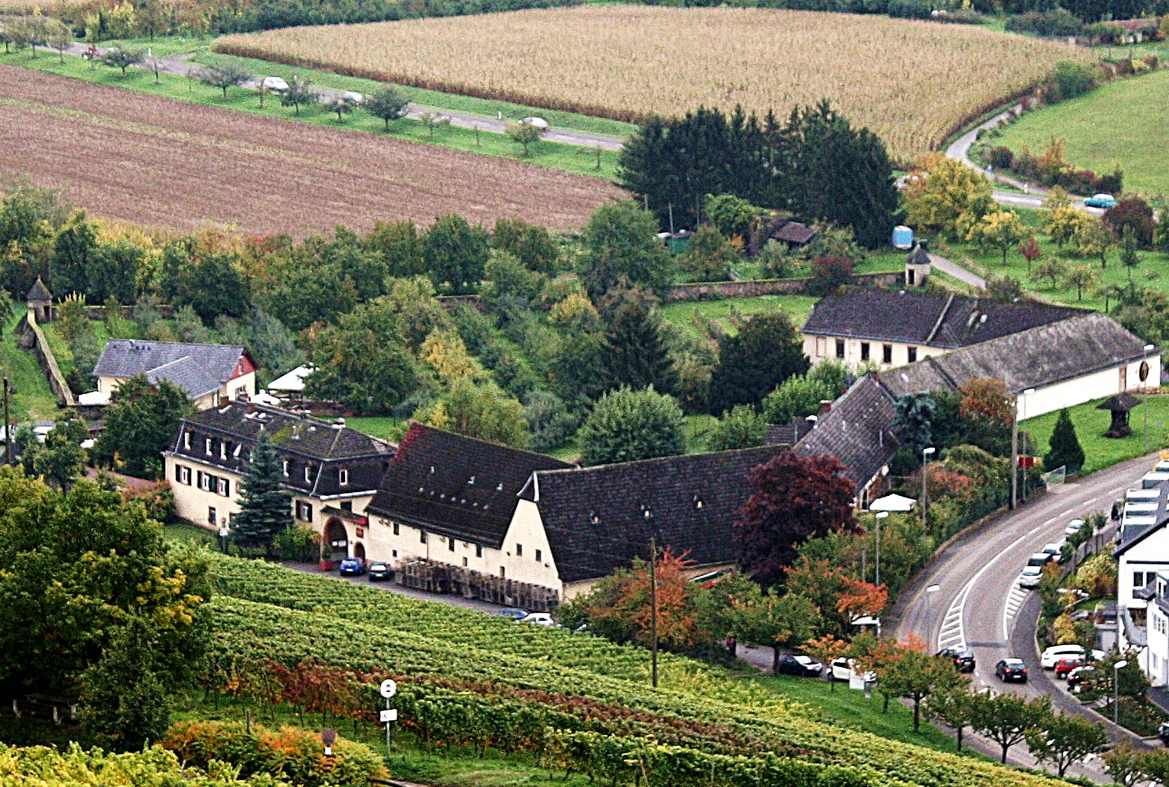 Hof Groroth Wiesbaden-Frauenstein